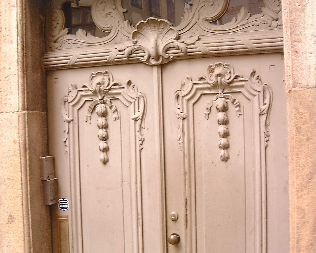 Detail of a street door at Kindstugatan, Gamla stan, Stockholm.